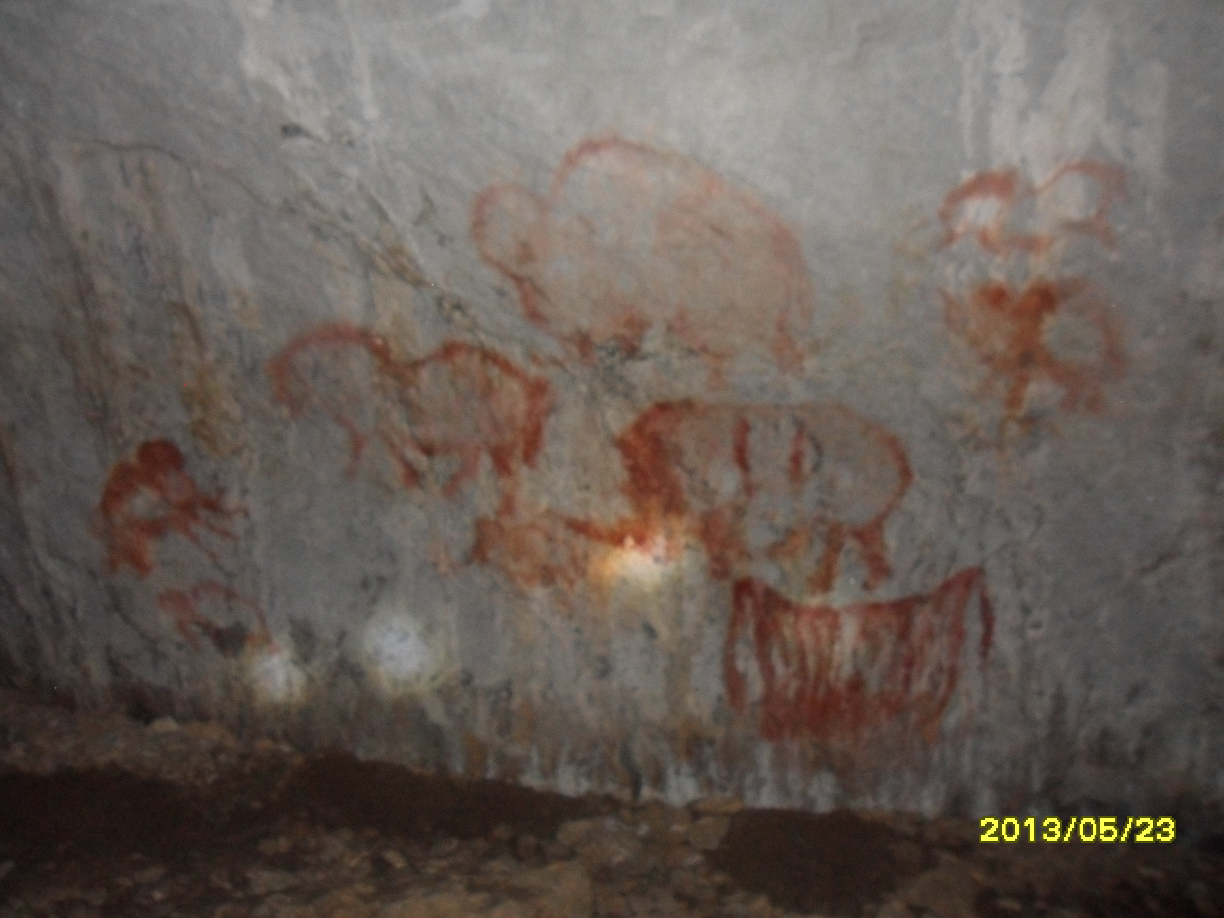 Капова пещера (Шульган-Таш), Бурзянский район This image is related to the protected area of Russia number 0220101